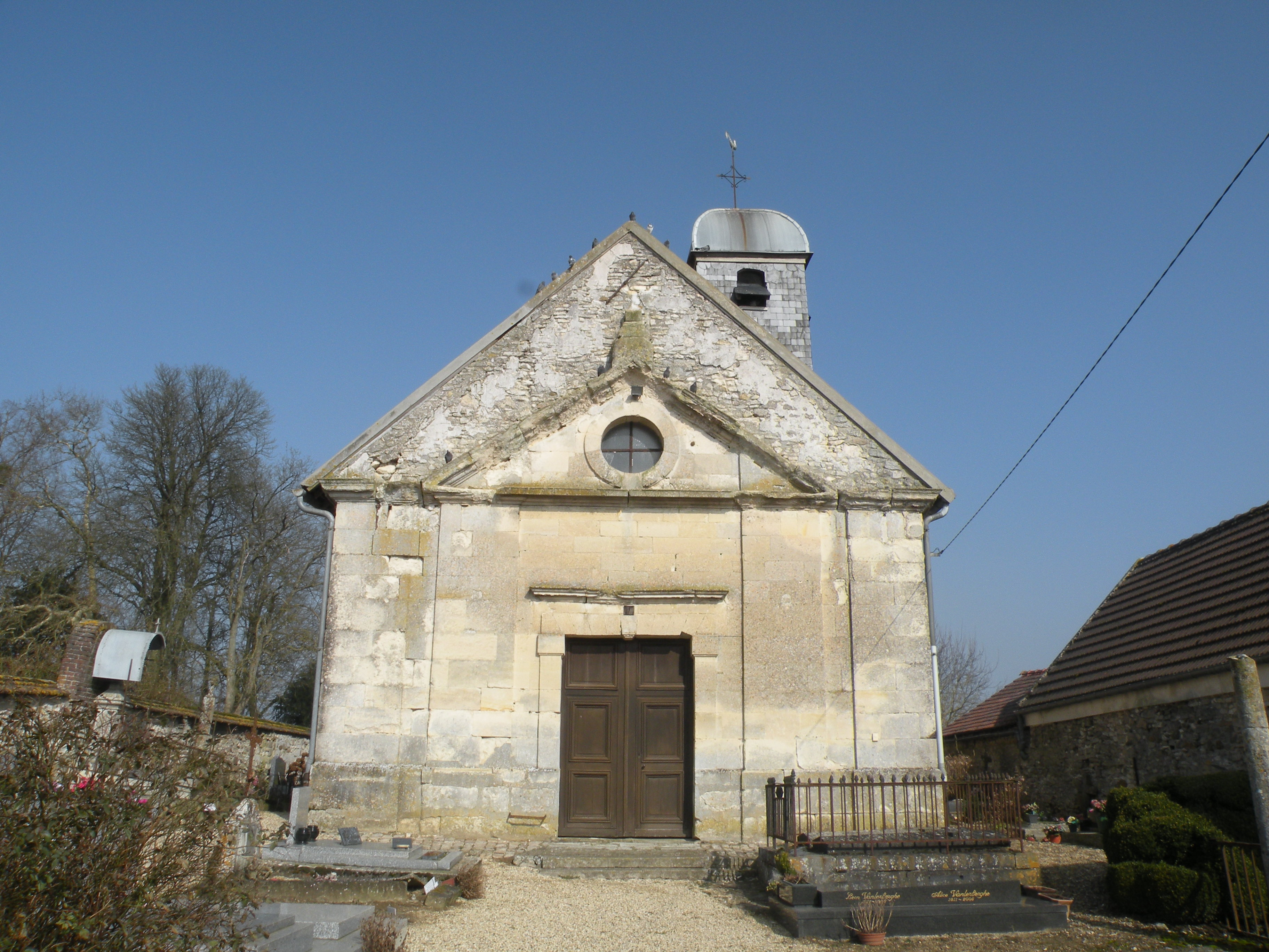 église de Rosières (Oise)